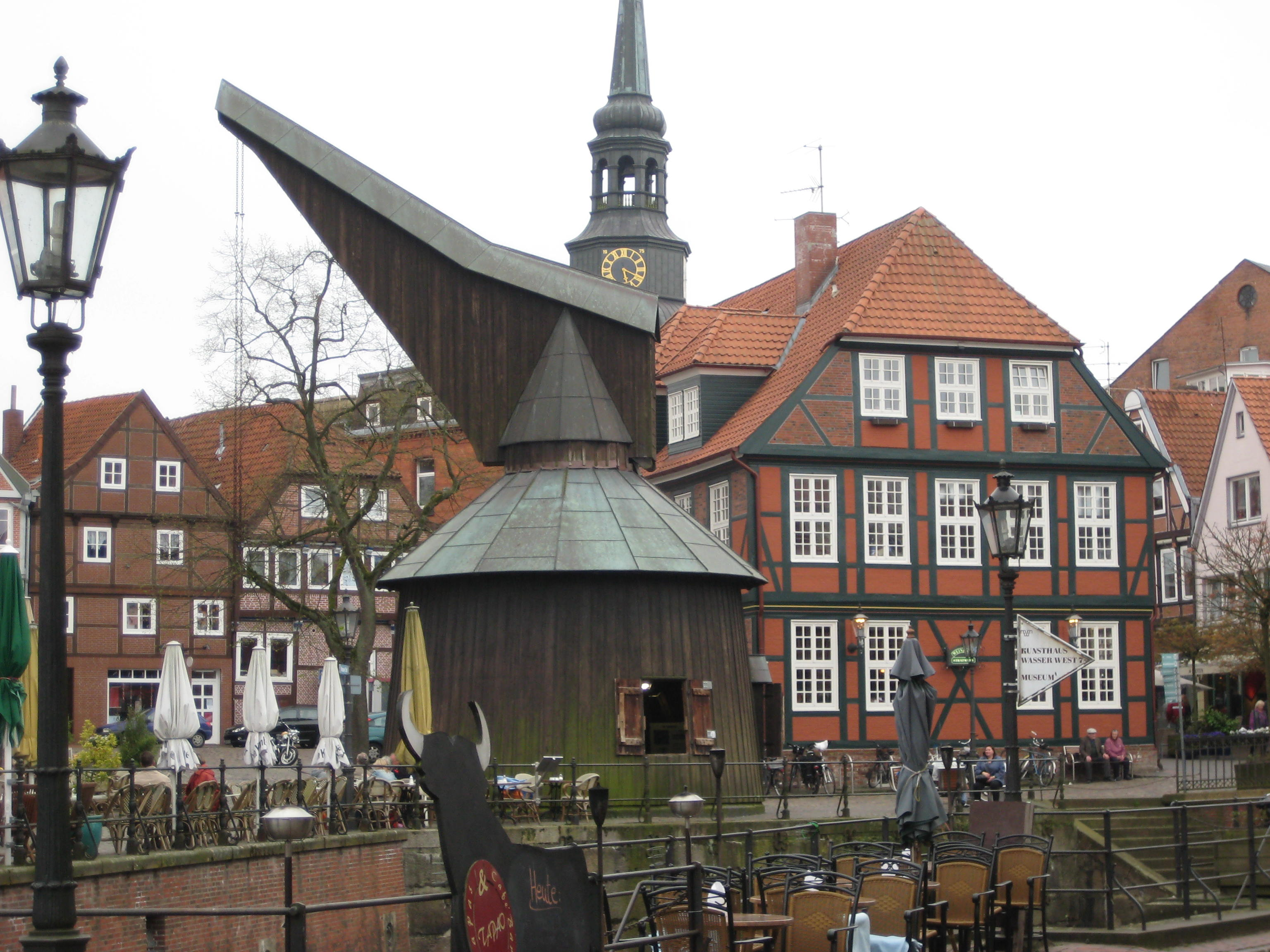 Holztretkran in Stade, Nachbau des Tretkrans in Lüneburg, nach Abriss des Originaltretkrans in Stade